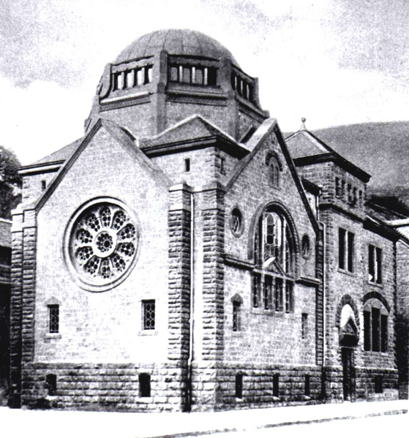 Neue Synagoge in Miltenberg, kurz nach der Fertigstellung 1904